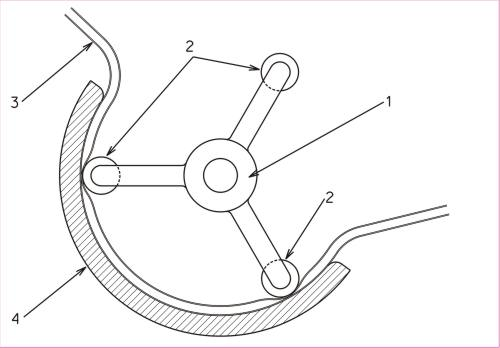 Schemat przykładowej pompy przewodowej przedstawia rysunek. Trójrolkowy wirnik (1) obracając się powoduje przetaczanie się rolek (2) po elastycznym przewodzie (3) ułożonym w korpusie pompy (4), które przepychają porcje cieczy zamkniętej pomiędzy dwoma rolkami.